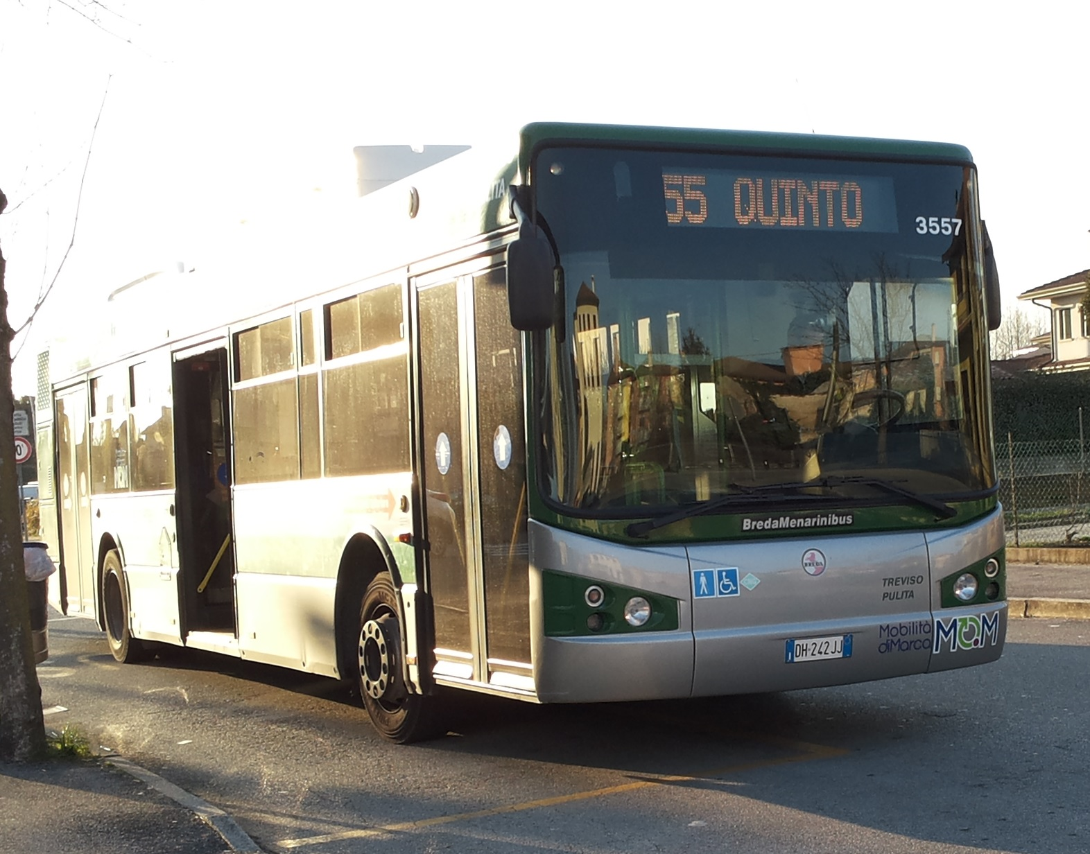 BredaMenarinibus Avancity urbano alimentato a metano (Euro 5) in servizio per Mobilità di Marca (Treviso)